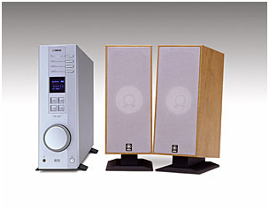 Акустическая система Yamaha Yamaha AP-U70 USB Multimedia Amplifier with DTS support Yamaha NS-U30 speaker pair